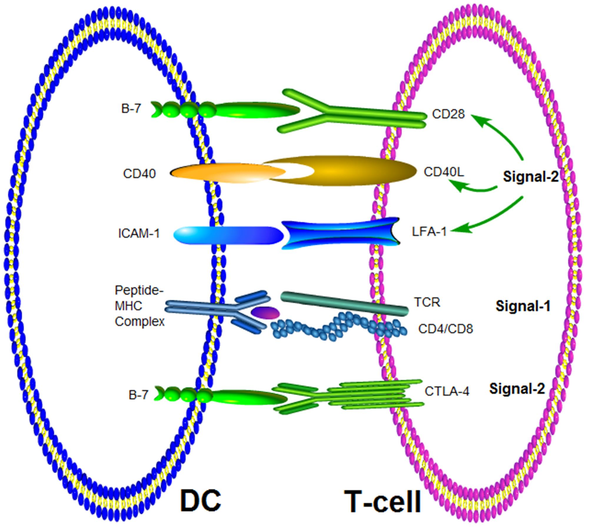 Synapse immunologique avec le complexe MHC-peptide/ TCR déclenchant le deuxième signal, les co-récepteurs CD4/CD8, les molécules co-stimulatrices assurant le deuxième signal et les des molécules d’adhésion cellulaires